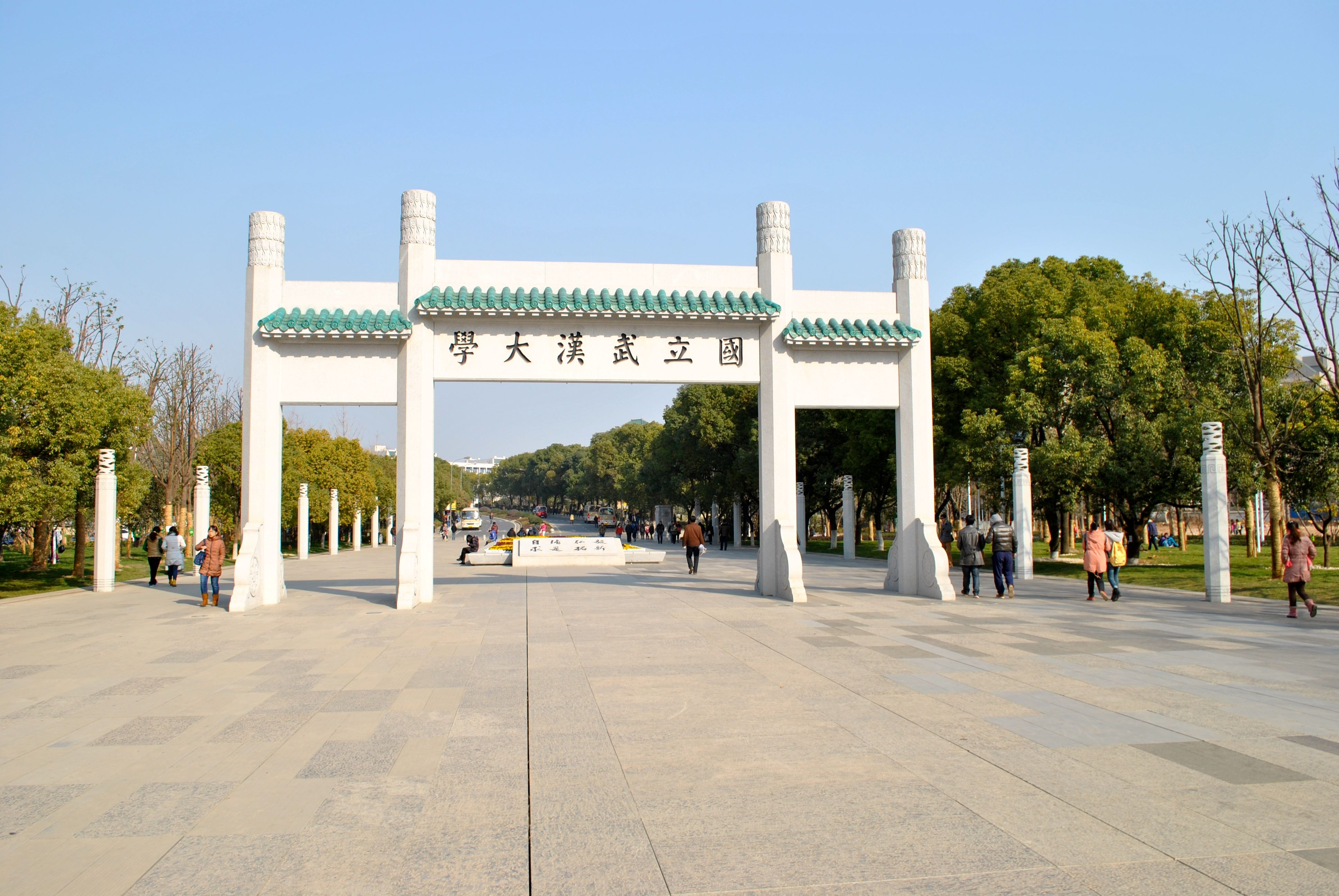 武大新校门。